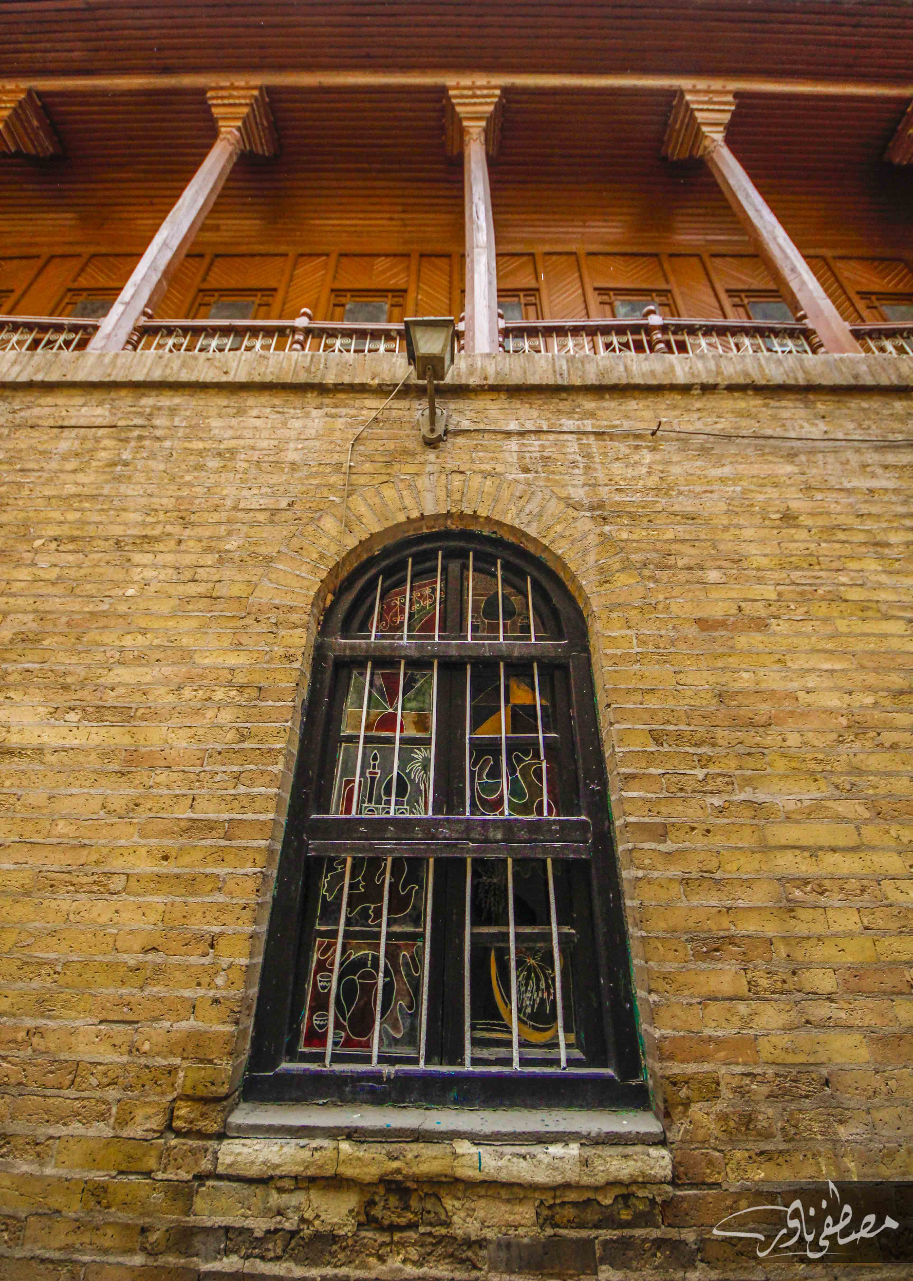 شنشول بغدادي